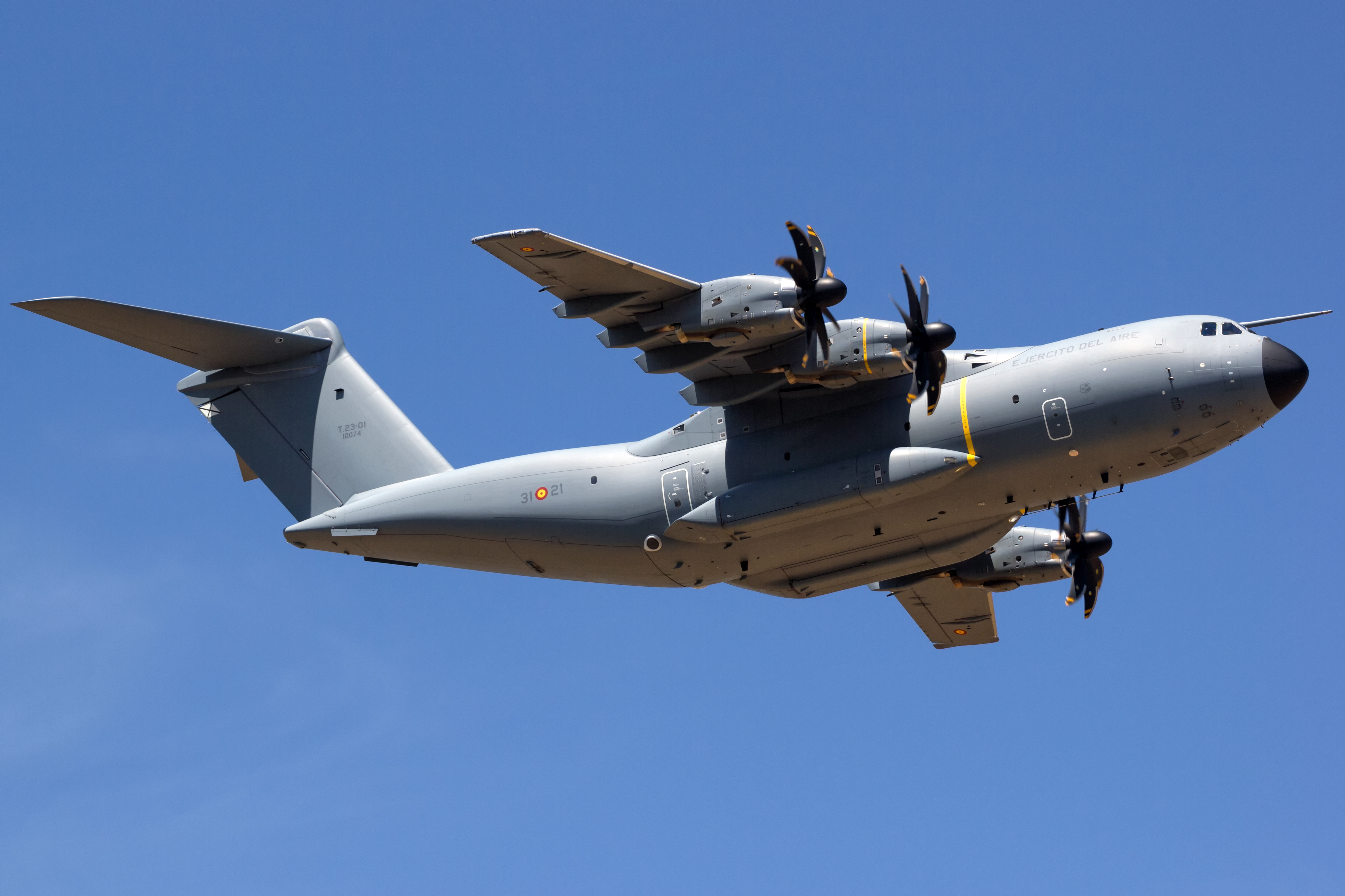 Airbus A400M do Exército do Aire español nos actos polo 25 aniversario da Academia Básica do Aire de León.